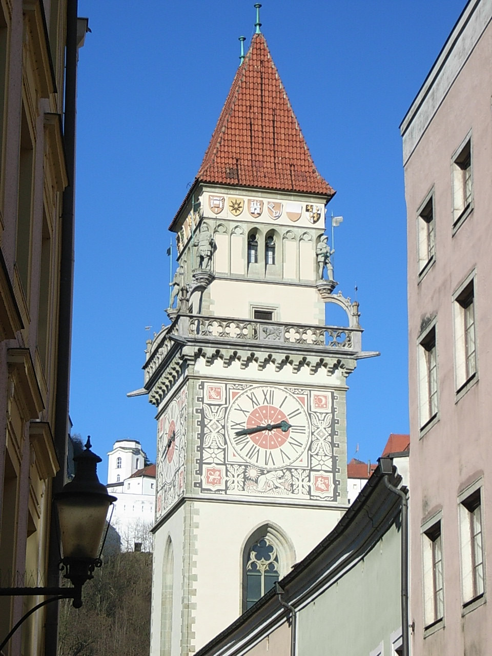 Rathausturm Passau